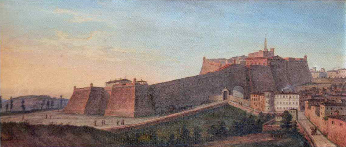 Veduta della fortezza Paolina di Perugia, Galleria Nazionale dell'Umbria